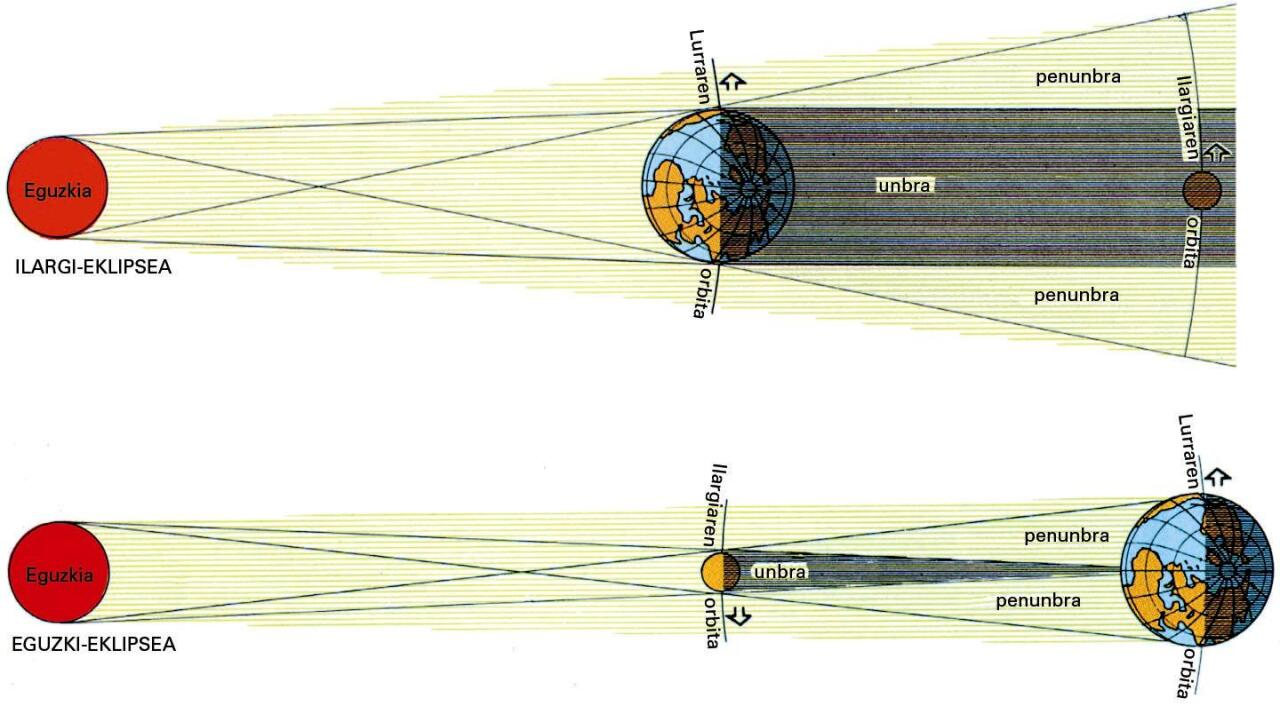 Ilargi-eklipsea eta eguzki-eklipsea (irudian ez daude eskalan)